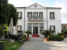 Villa storica nel centro di Legnaro: villa Baretta